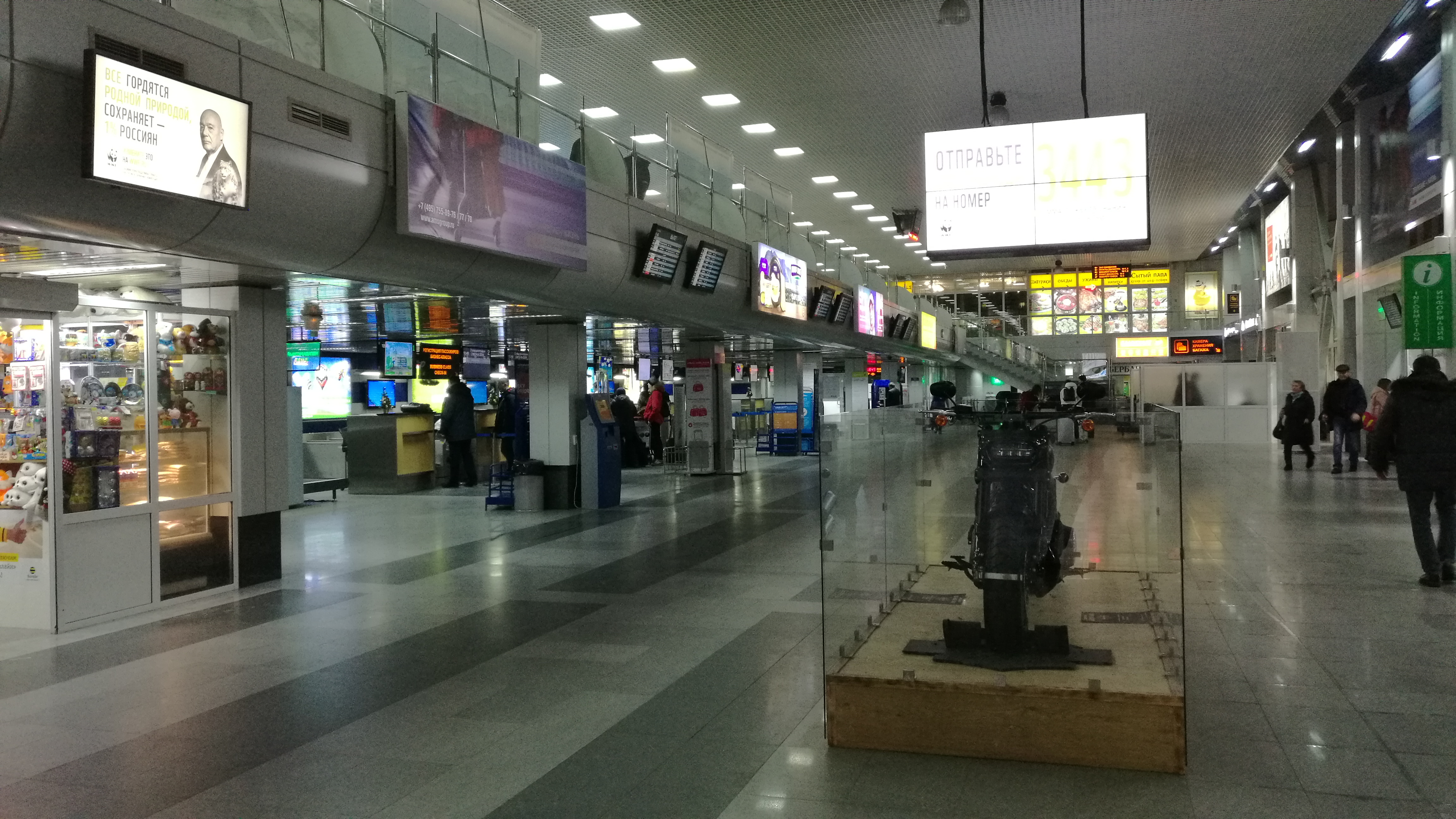 La flughaveno Irkutsko, Rusio.